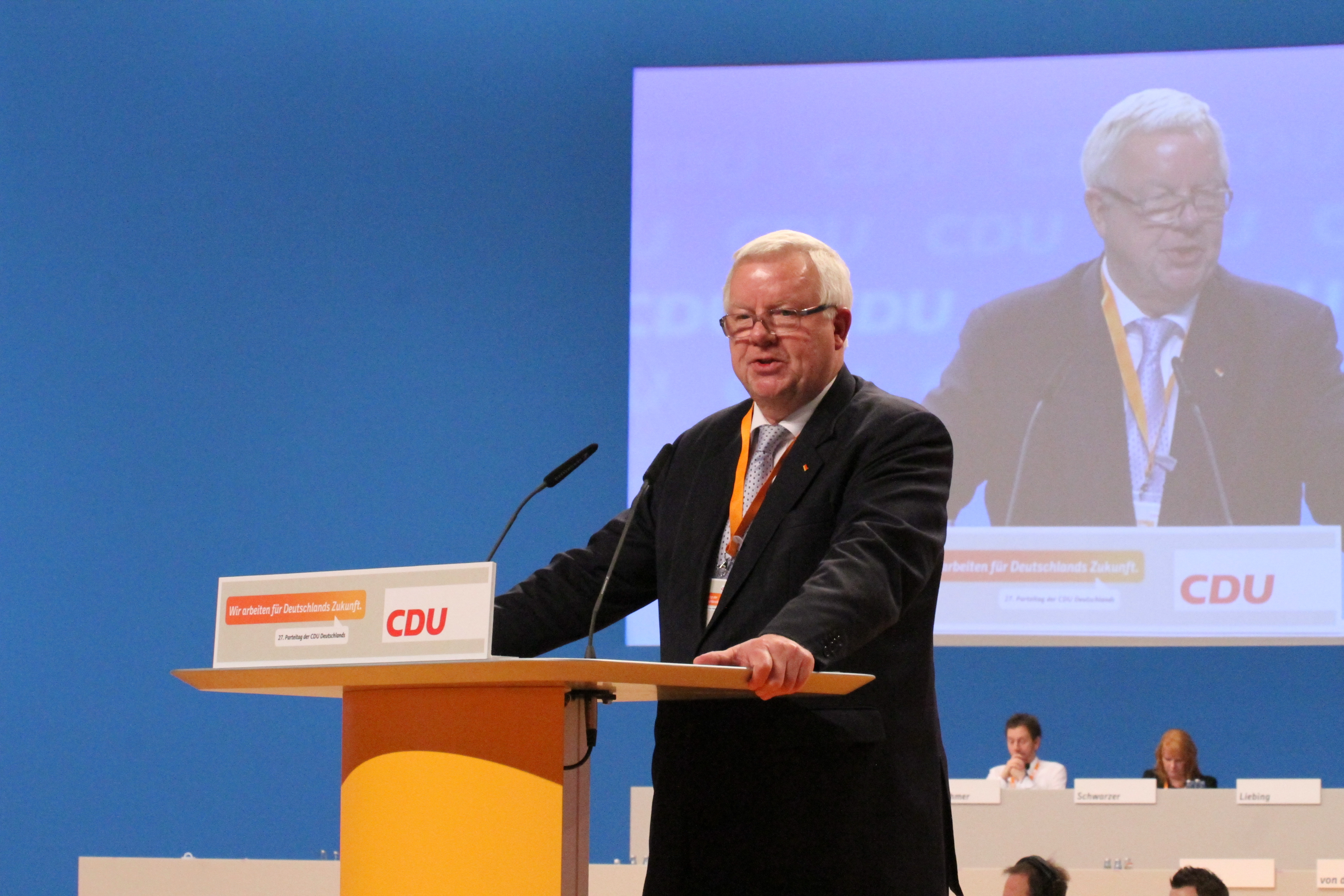 Michael Fuchs auf dem CDU Bundesparteitag Dezember 2014 in Köln